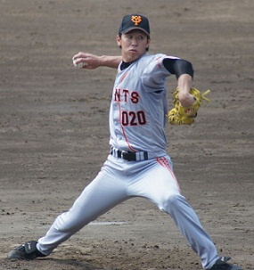 Giants_naruse_020